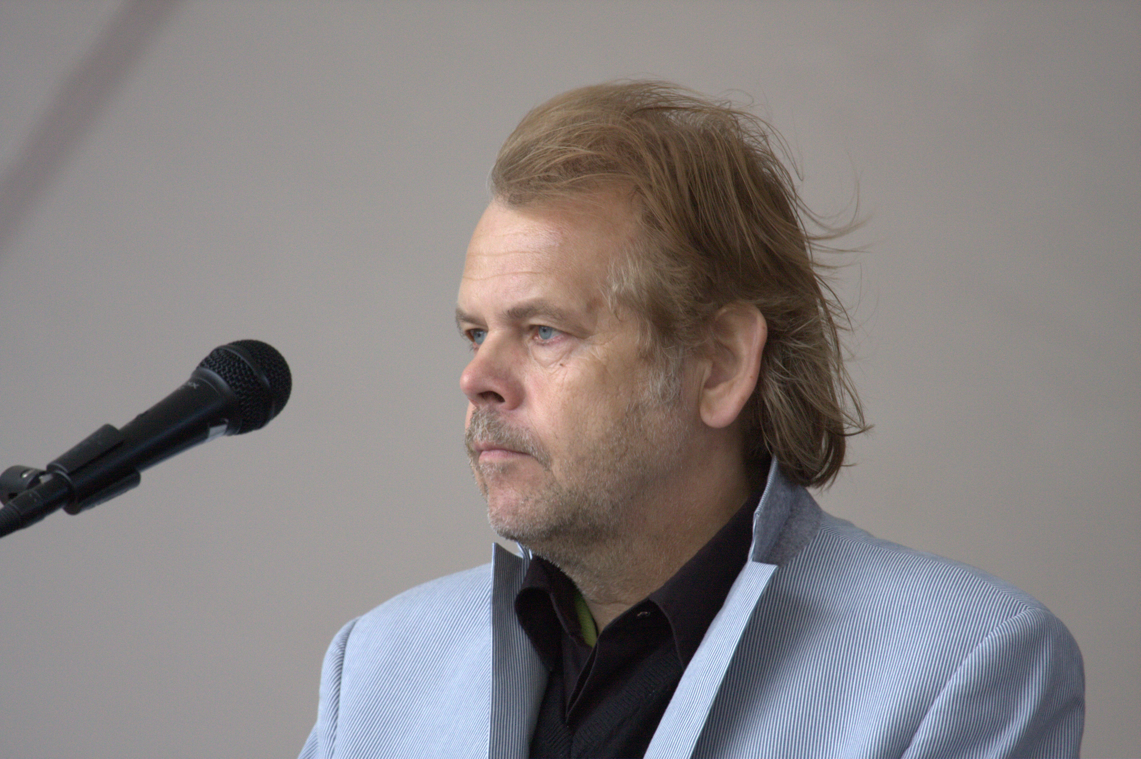 Heimo Mäntynen suomalainen urkujensoittaja ja säestäjä